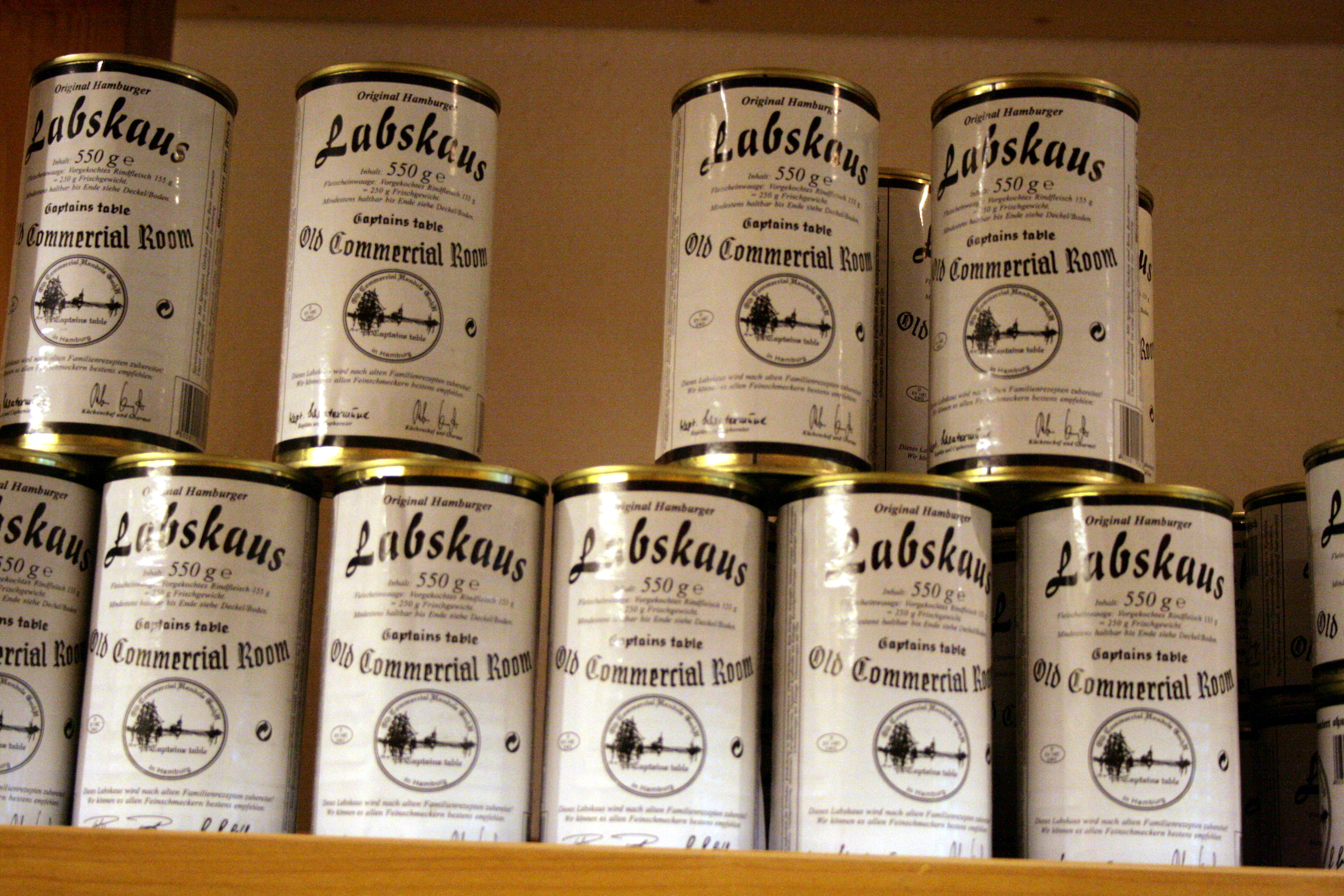 Westfälische Labskaus, endosen in Old Commercial Room.